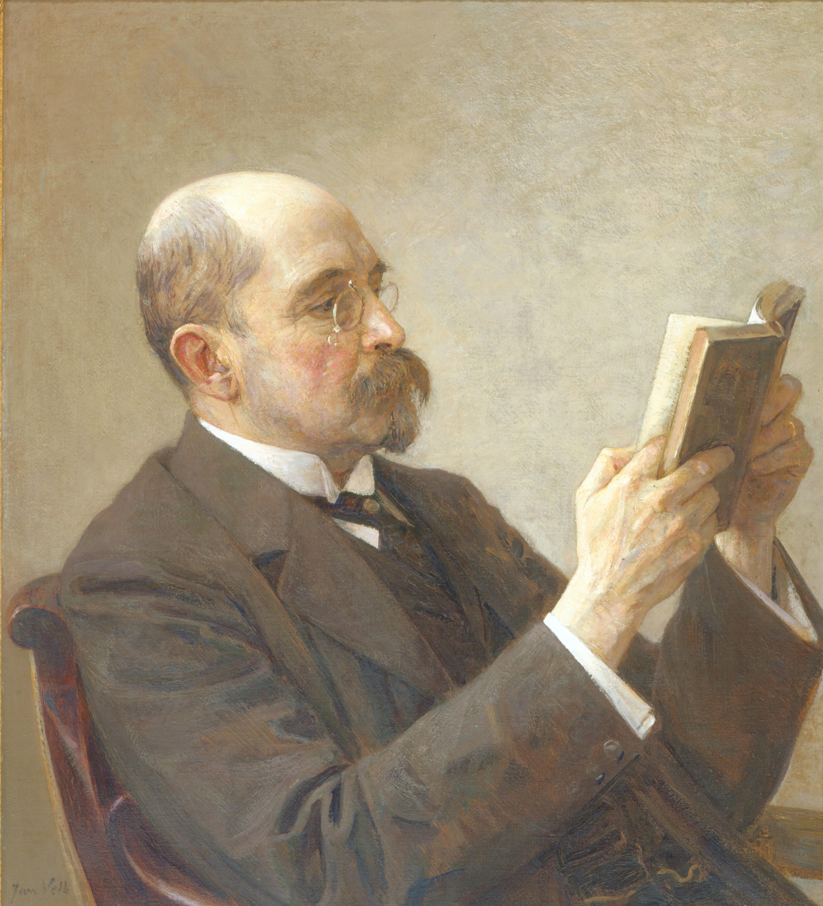 portret (olieverf op doek) van Daniël Josephus Jitta (1854-1925)